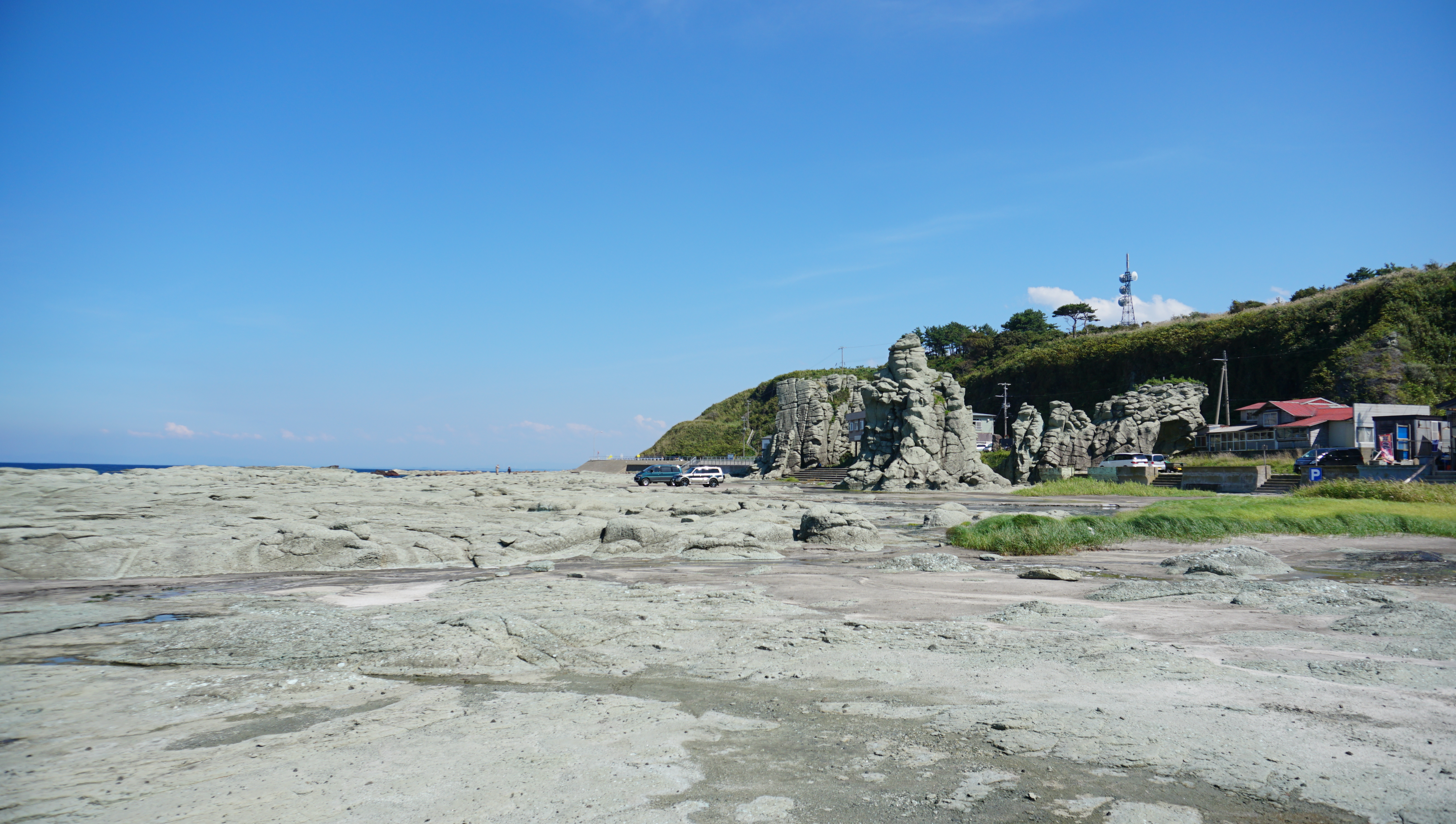 千畳敷海岸（青森県西津軽郡深浦町）